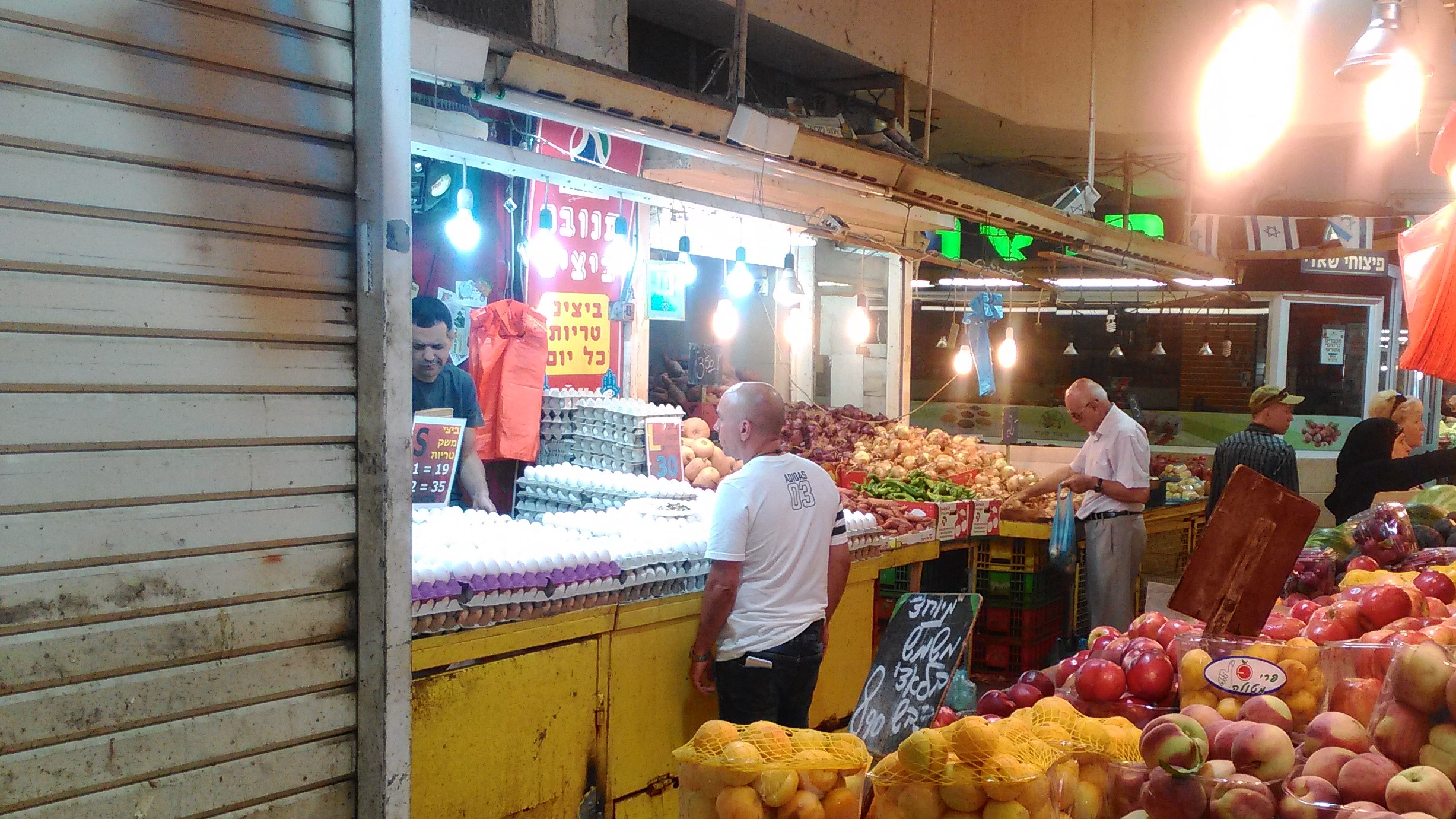 דוכנים בשוק, 2017